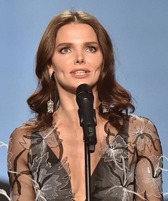 Премия Золотая маска - 2017 года